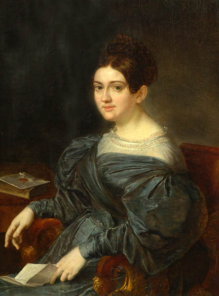 Кожина Лидия Николаевна, урожд. Всеволожская (1805– 1881), незаконнорожденная дочь Николая Сергеевича Всеволожского, во втором браке после 1838 года за французским виконтом де Жюльвекур, журналистом и литератором.